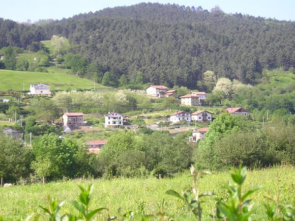 Olabarriko auzoa